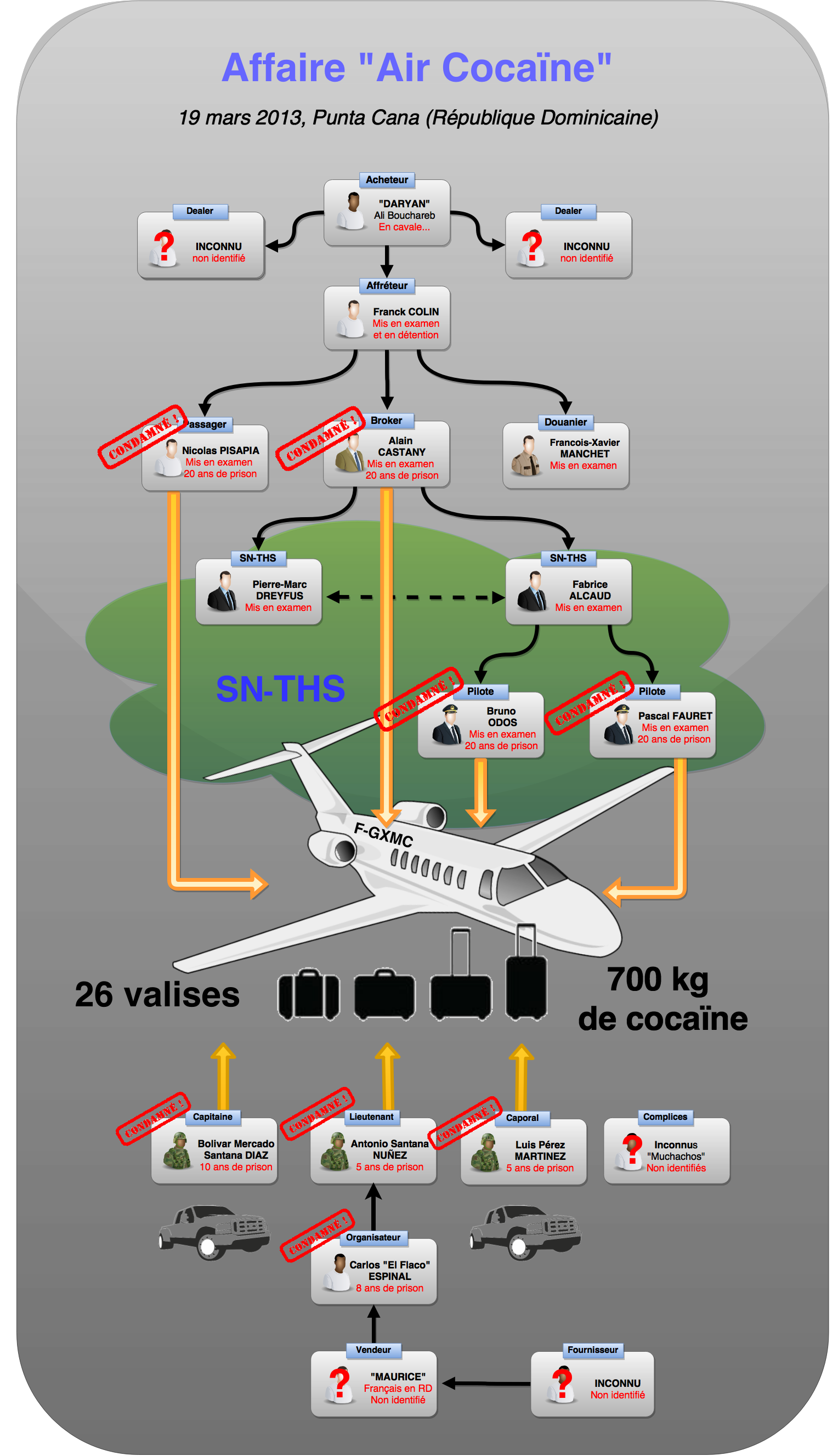 Diagramme des protagonistes de l'affaire "Air Cocaïne"